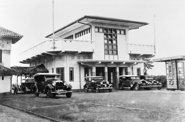 Repronegatief. De aankomsthal van het vliegveld Tjililitan nabij Meester Cornelis.